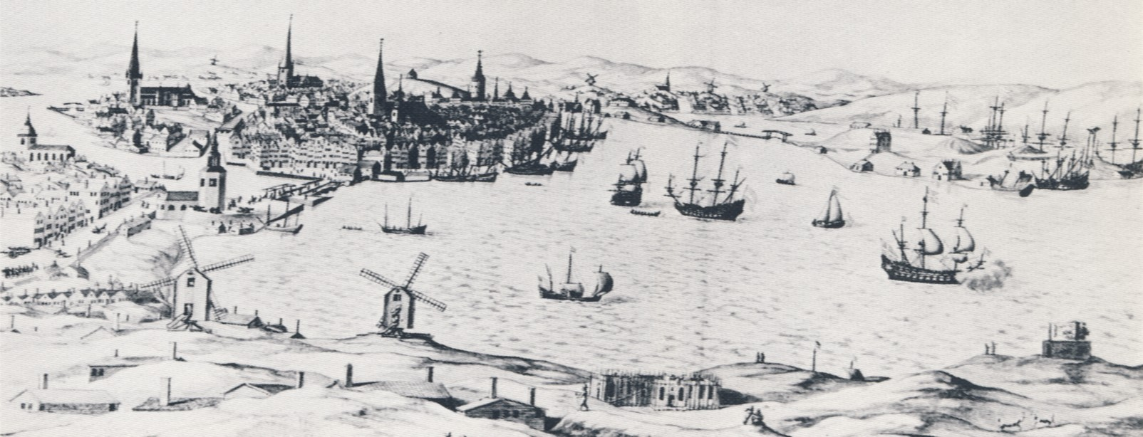 Vy från Södermalm över Stockholm